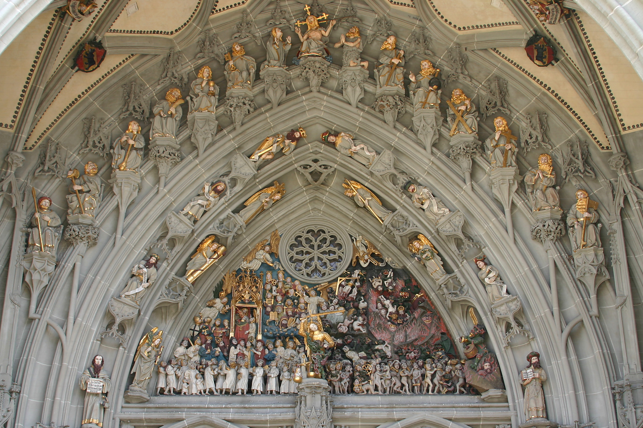 Portal, Berner Münster, Bern, Switzerland